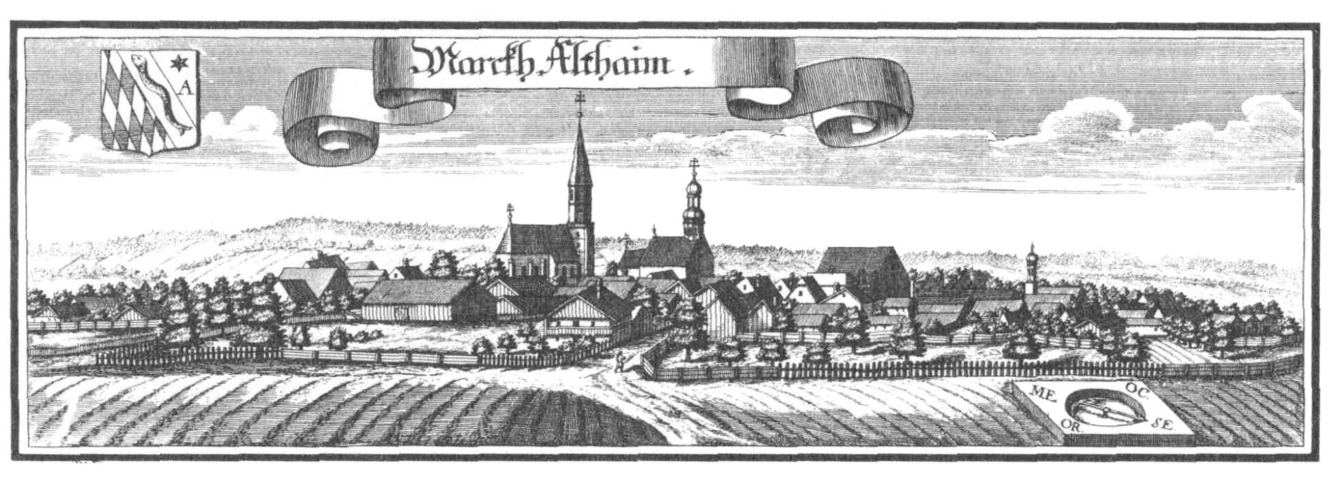 Ansicht von Altheim nach einem Kupferstich von Michael Wening von (1721)